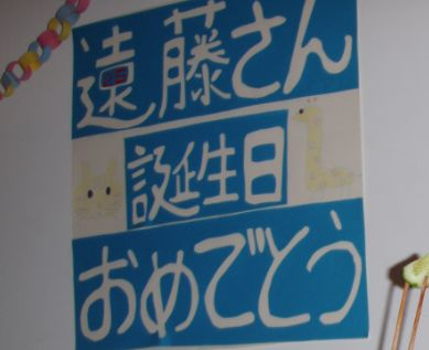 １０月３１日生まれ 千葉県出身 趣味：裁縫 資格：アドバンスドオープンウォーターすくーばだいばー